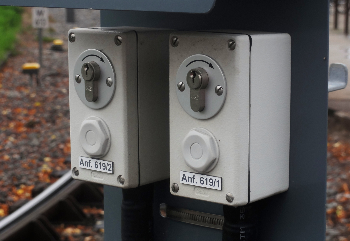 Schlüsselschalter zur Anforderung der Fahrstrasse am Signal 619 in Heddesheim OEG.